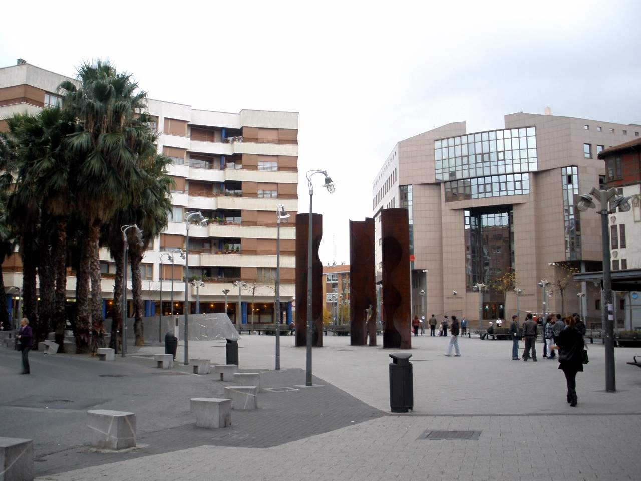 Plaza Bide Onera (Barakaldo)